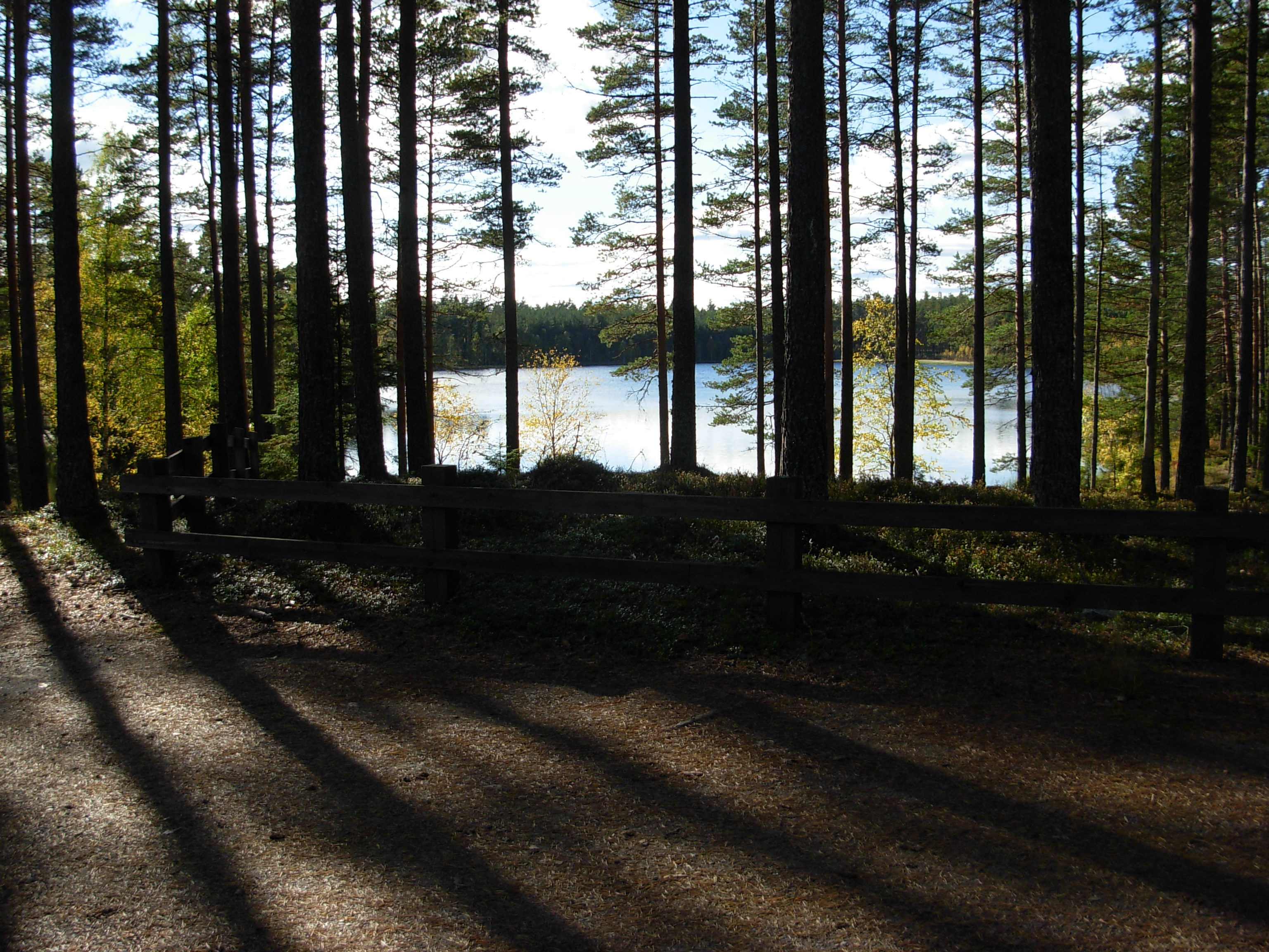 Stora tjärnen ligger i Brattforshedens naturreservat i Värmland.